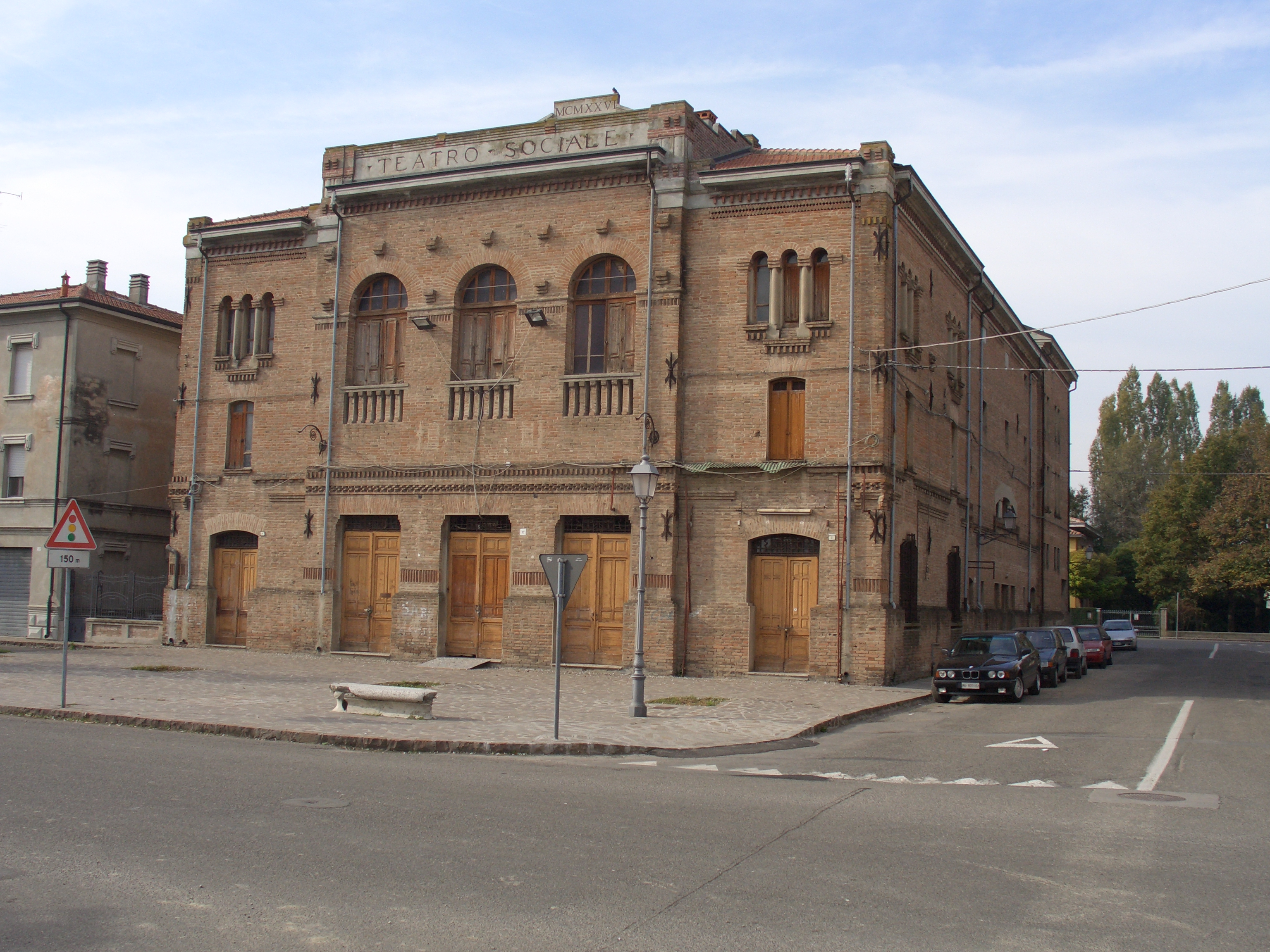 Teatro comunale novi di modena pre sisma 2012